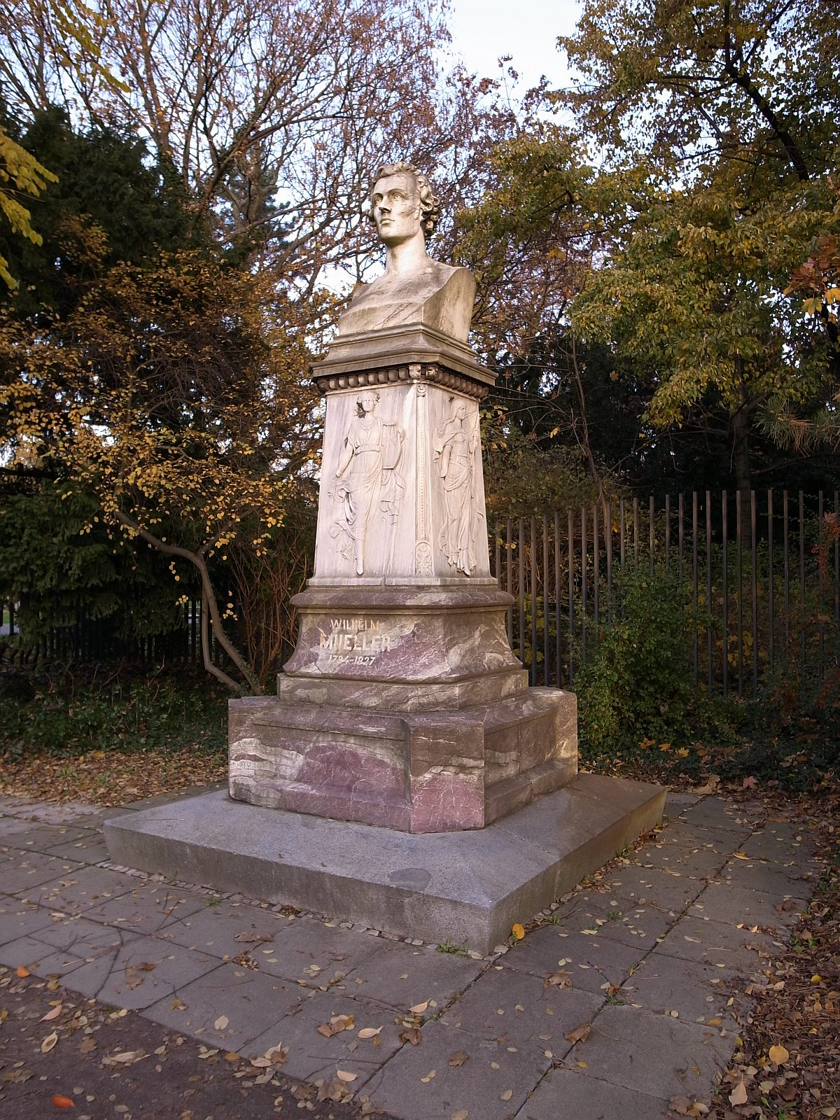 Wilhelm Müller (Dichter), Denkmal im Stadtpark Dessau (1893)